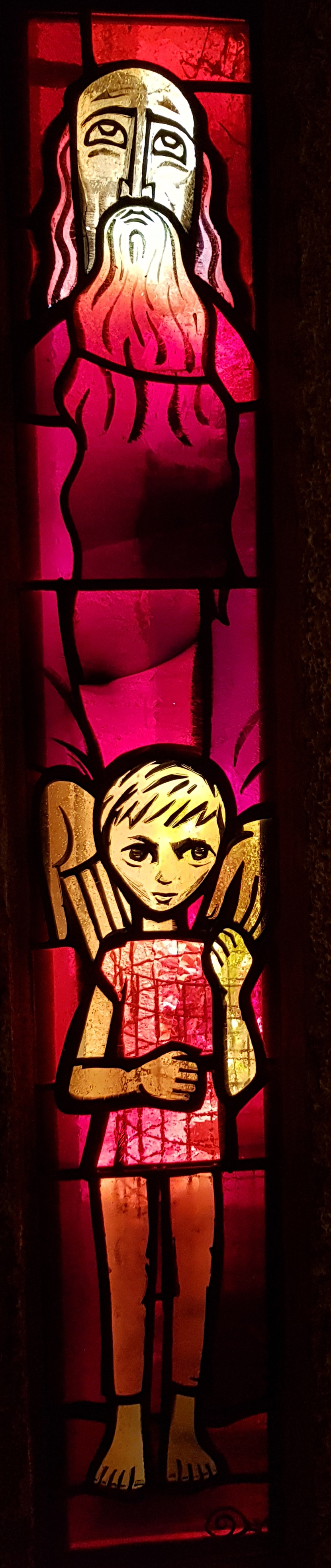 Kirchenfester in der Krypta: Abraham und Isaak